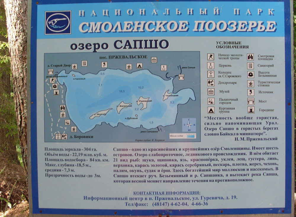 дно озера Сапшо